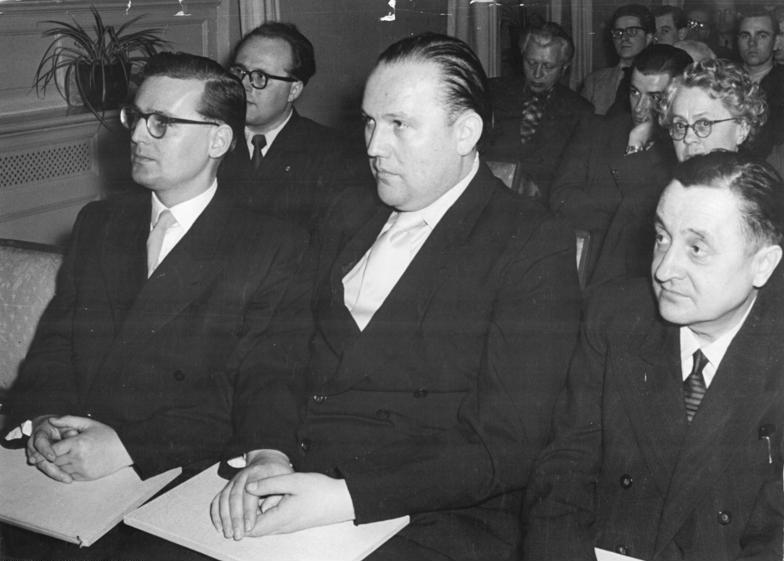 Zentralbild Quasch. 25.5.1956 Verleihung des Heinrich-Mann-Preises 1956. Die feierliche Verleihung des Heinrich-Mann-Preises 1956 erfolgte am 27.3.1956, dem 85. Geburtstag Heinrich Manns, der 1950 fern seiner deutschen Heimat gestorbenen großen literarischen Vorkämpfers einer demokratischen Erneuerung Deutschlands, in der Deutschen Akademie der Künste zu Berlin. Der Preis wurde verliehen an den Schriftsteller Franz Fühmann, für seine Dichtung "Die Fahrt nach Stalingrad", den Schriftsteller Wolfgang Schreyer für seinen Roman "Unternehmen Thunderstrom" und an den Schriftsteller Rudolf Fischer für seinen Roman "Martin Roop IV". Akademiemitglied Professor Dr. h.c. Ludwig Rehm verlas die Begründung für die Verleihung und überreichte den Ausgezeichneten die Urkunden. (Näheres siehe ADN bpm 27.3.1956). UBz. (v.l.n.r.) Die mit dem Heinrich-Mann-Preis 1956 ausgezeichneten Schriftsteller Wolfgang Schreyer, Franz Fühmann und Rudolf Fischer.